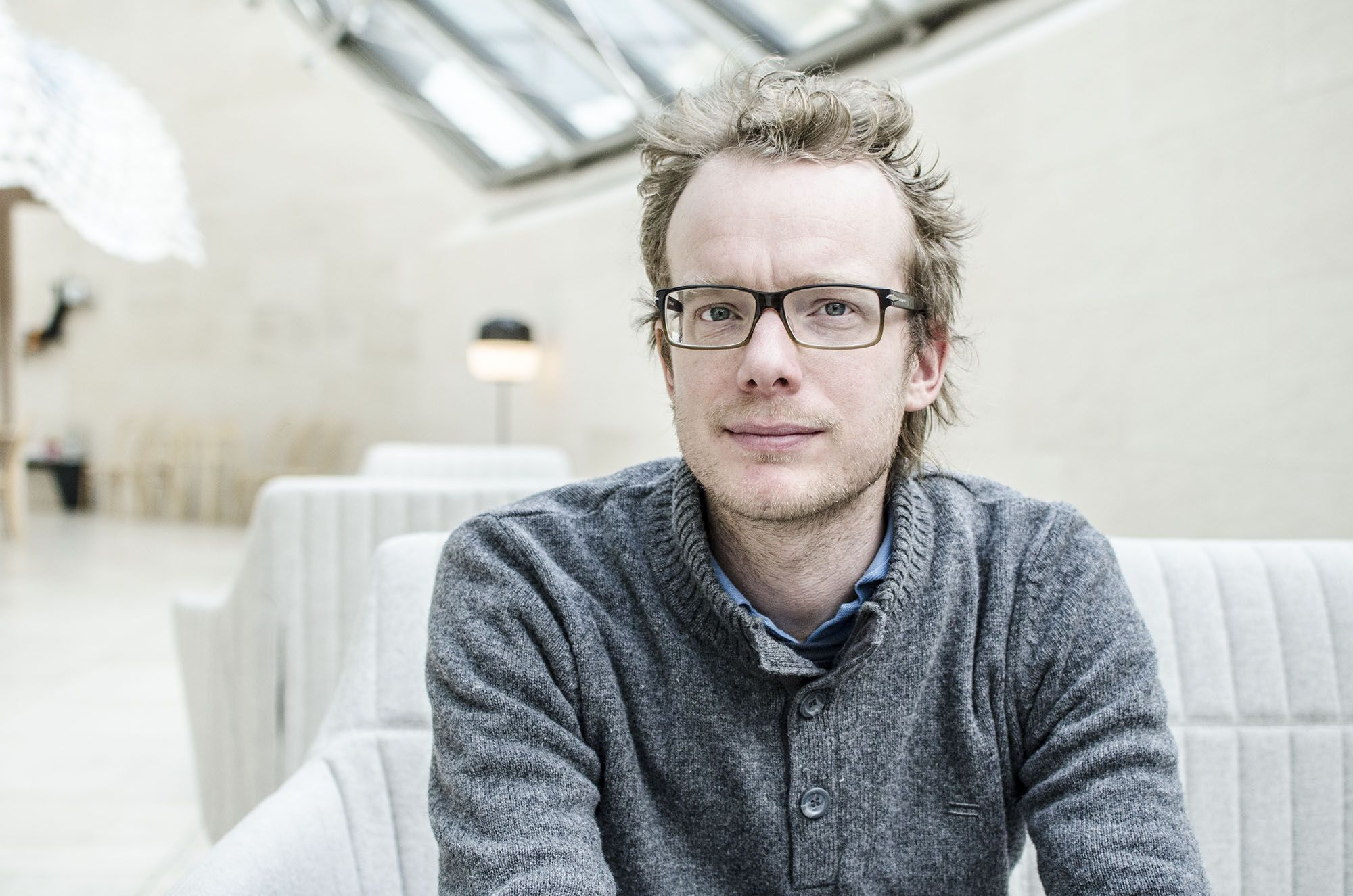 Portrait Pierre Hansen